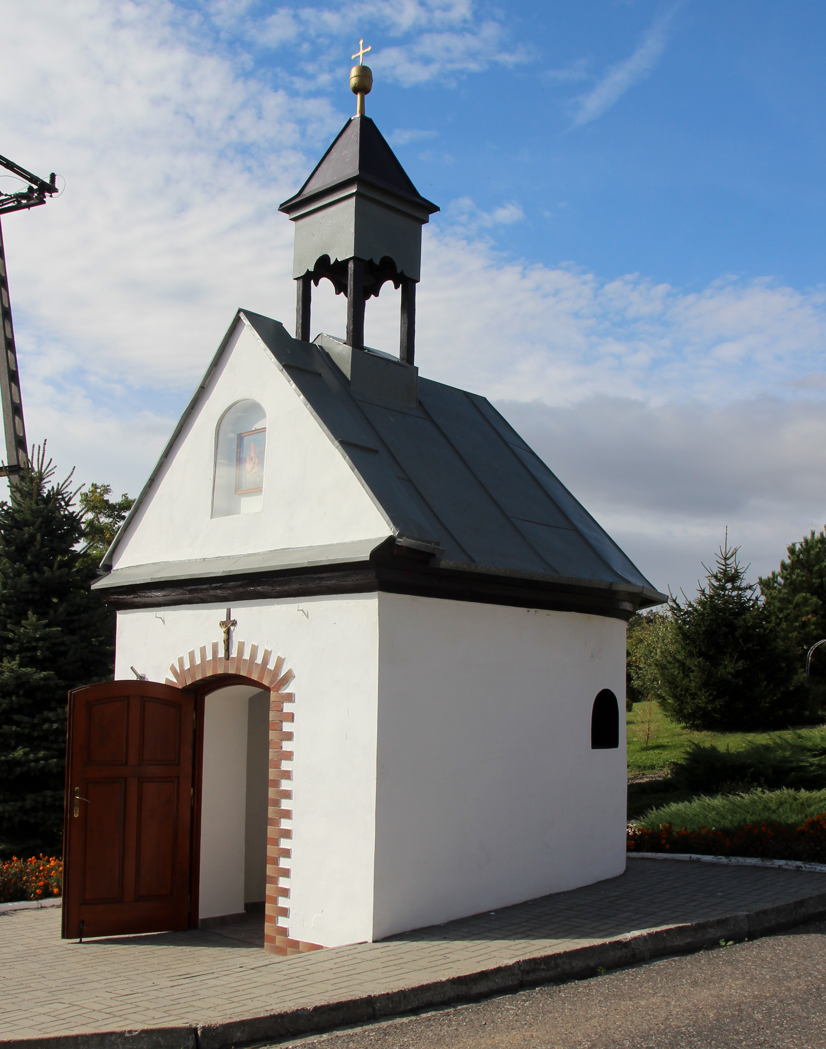 Chrósty – wieś w Polsce położona w województwie opolskim, w powiecie kędzierzyńsko-kozielskim, w gminie Pawłowiczki.